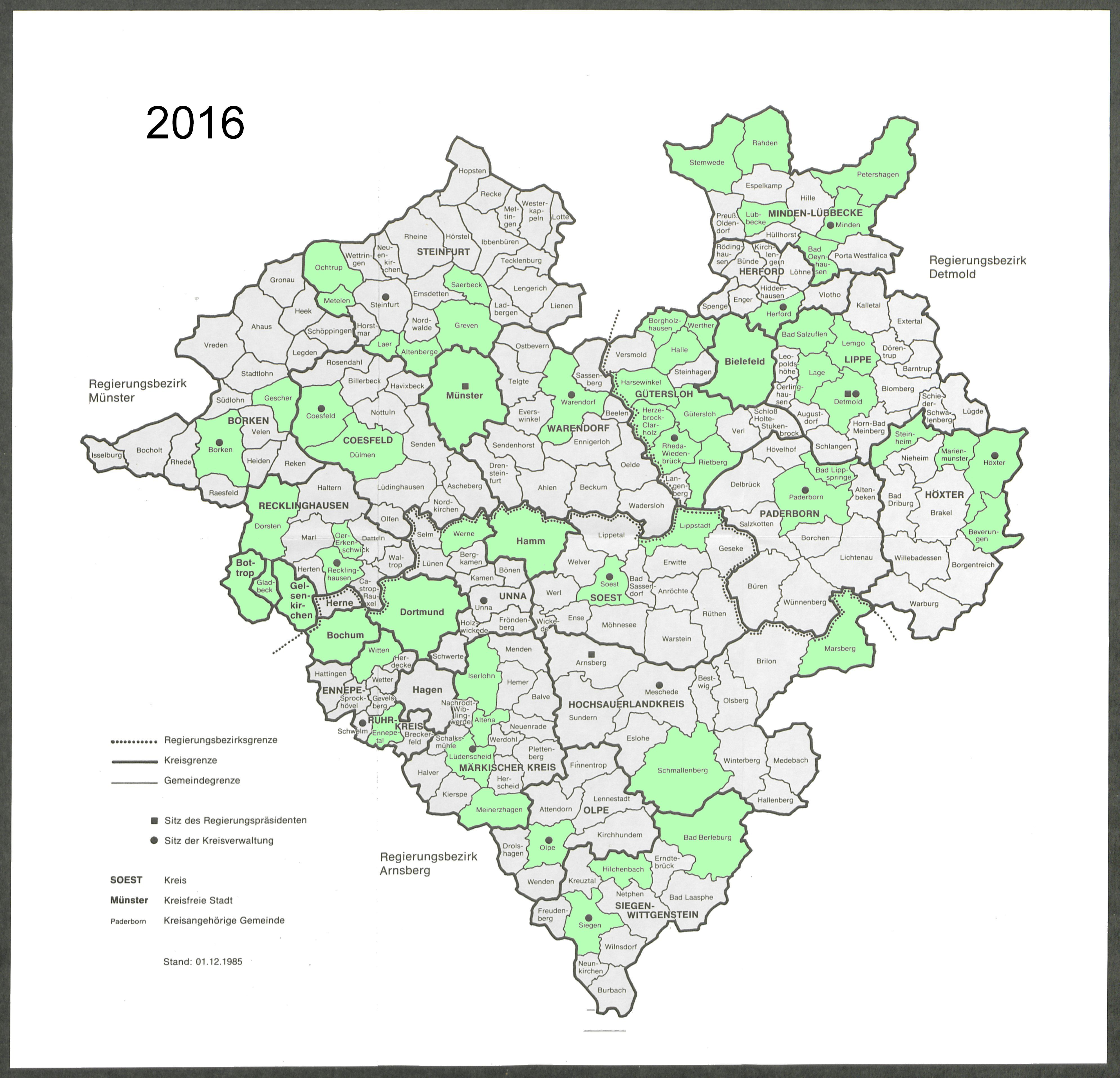 Übersichtskarte der Teilnehmer am Projekt der LISE